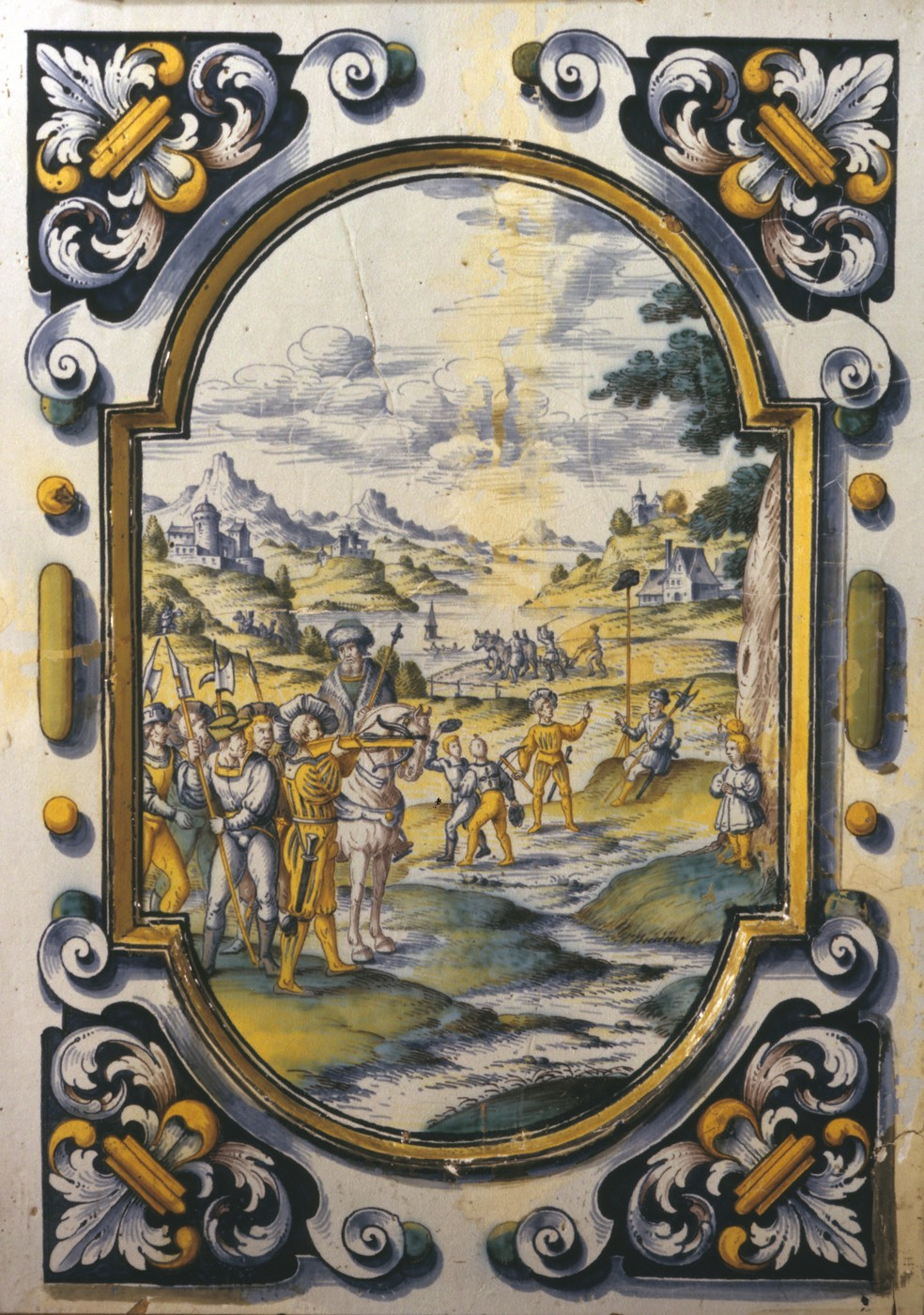 Kachel eines „Pfauofens“, Zürich, Schweizerisches Landesmuseum